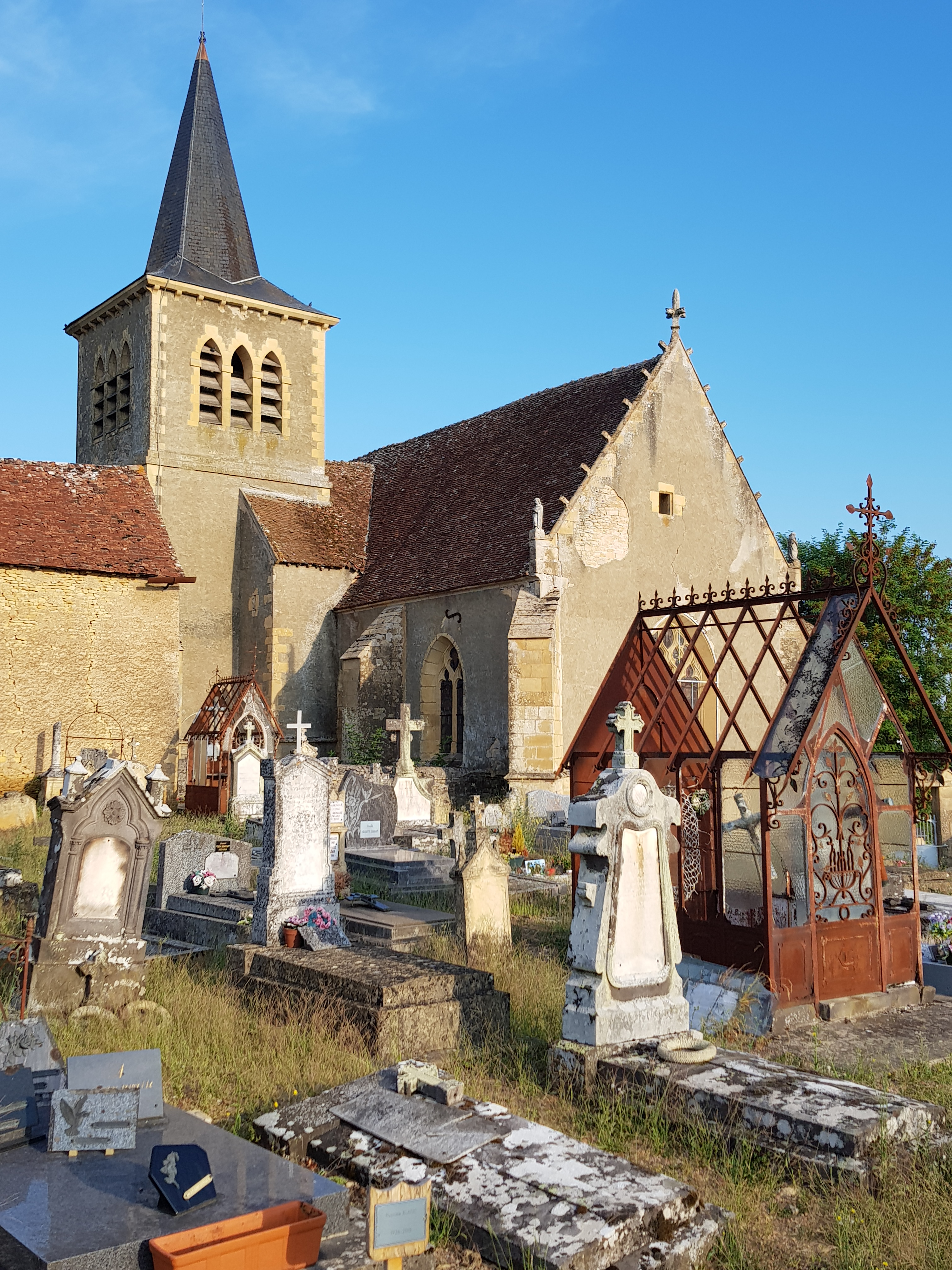 Eglise de Nolay (58), vue du cimetière.